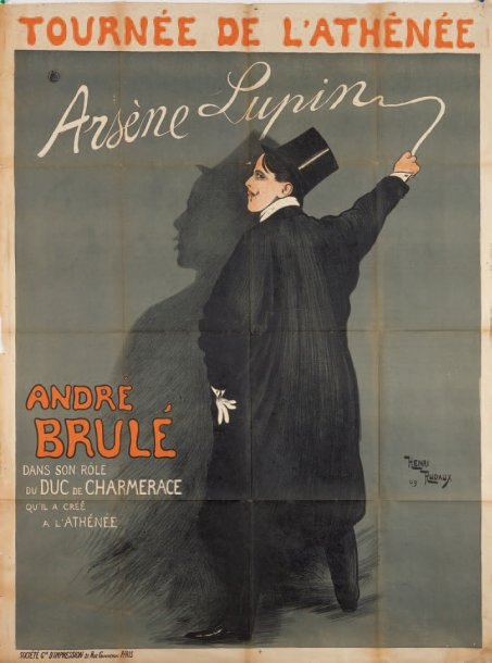 Tournée de l'Athénée. Arsène Lupin. André Brulé dans son rôle du Duc de Charmerolle, affiche peinte par Henri-Edmond Rudaux, Paris, Société générale d'impression, 1909, 158 x 117 cm.